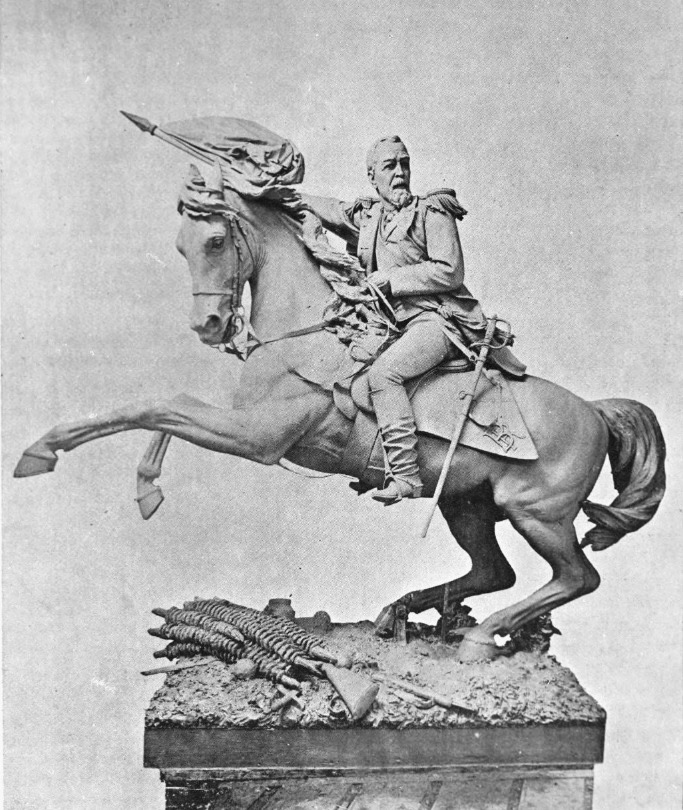 Monumento a Barrios antes de ser instalado en el Palacio de la Reforma. 1896